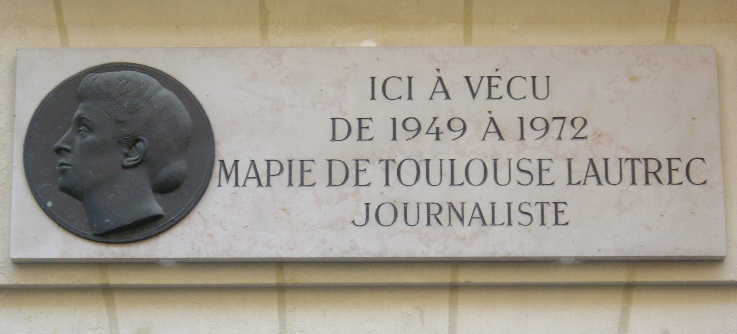 Plaque commémorative, 6 rue Marcel-Renault, Paris 17e. « Ici a vécu de 1949 à 1972 Mapie de Toulouse-Lautrec, journaliste. »